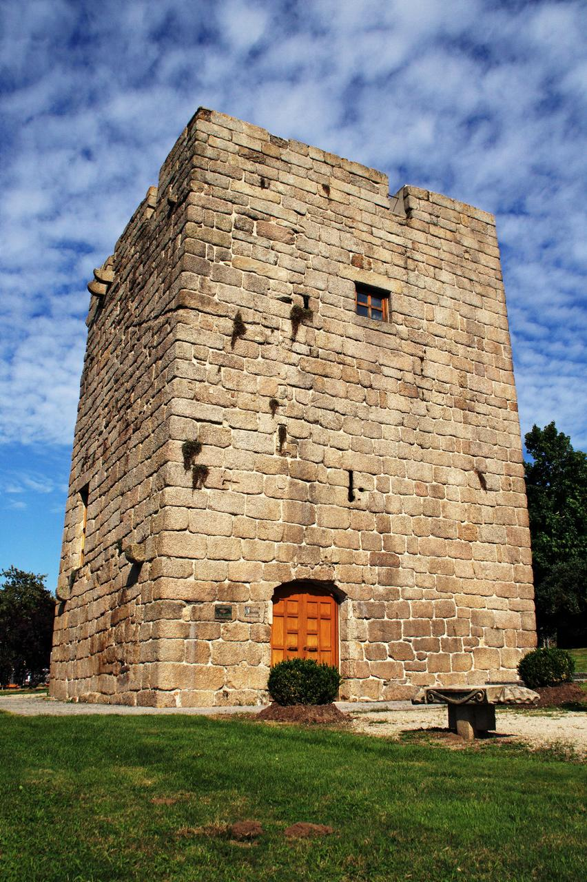 Torre de Celas de Peiro - Culleredo - A Coruña